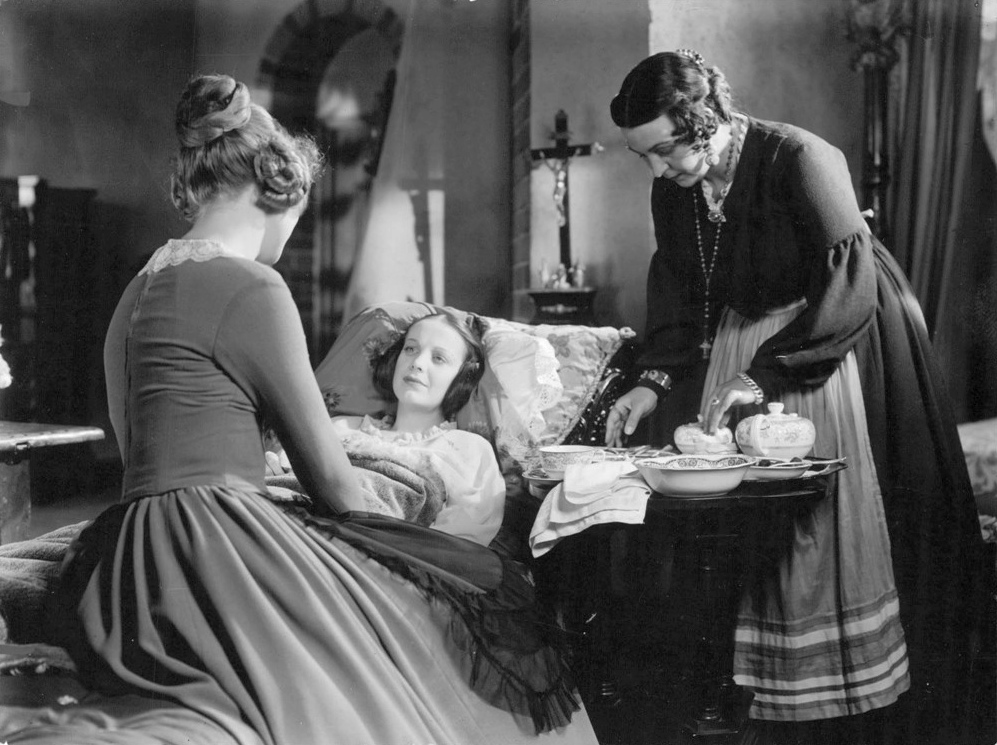 Emelie Högqvist. Film 1939. Irma Christenson – Signe Hasso.